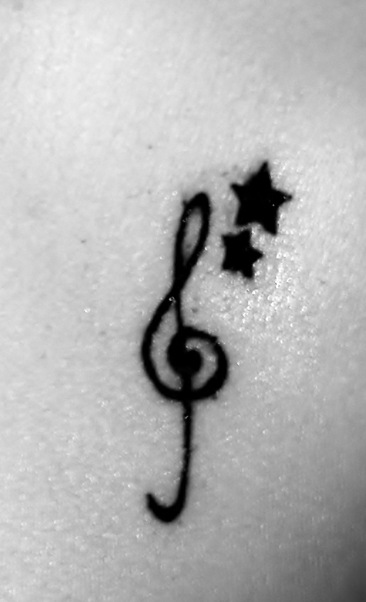 És una fotografia d'una clau de sol tatuada.